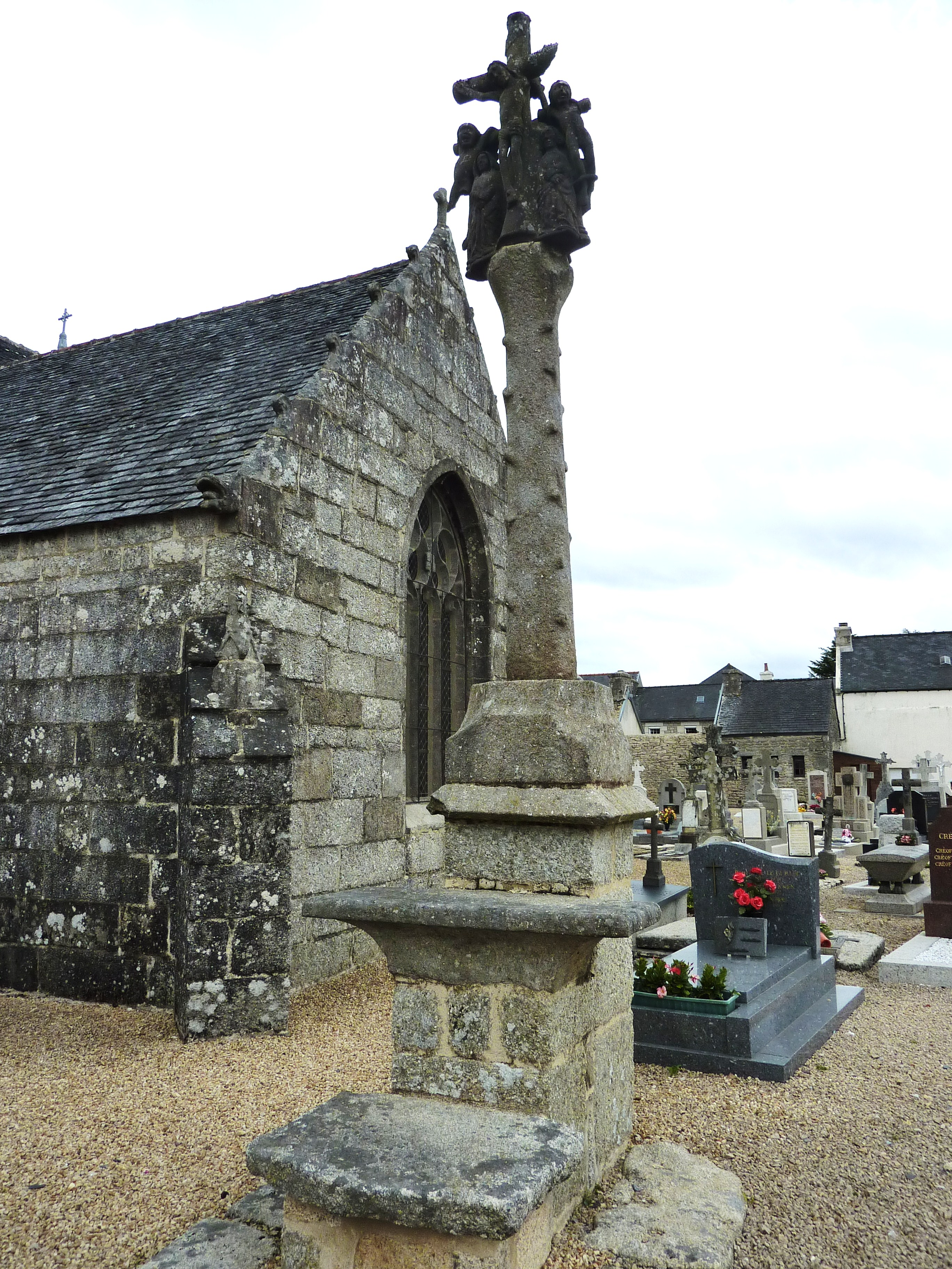 Berrien: le calvaire dans le vieux cimetière au sein de l'enclos paroissial, XVIe siècle, avec "marche surélevée pour le crieur public et table d'offrande".Atlas des croix et calvaires du Finistère